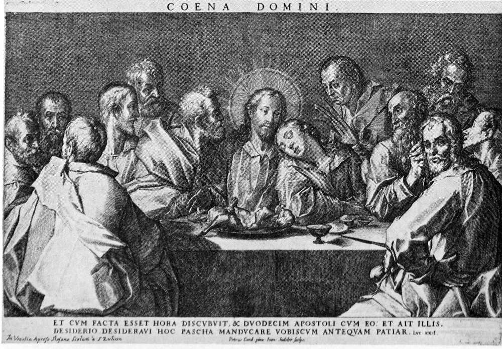 Stik Sadeler Candid JEK